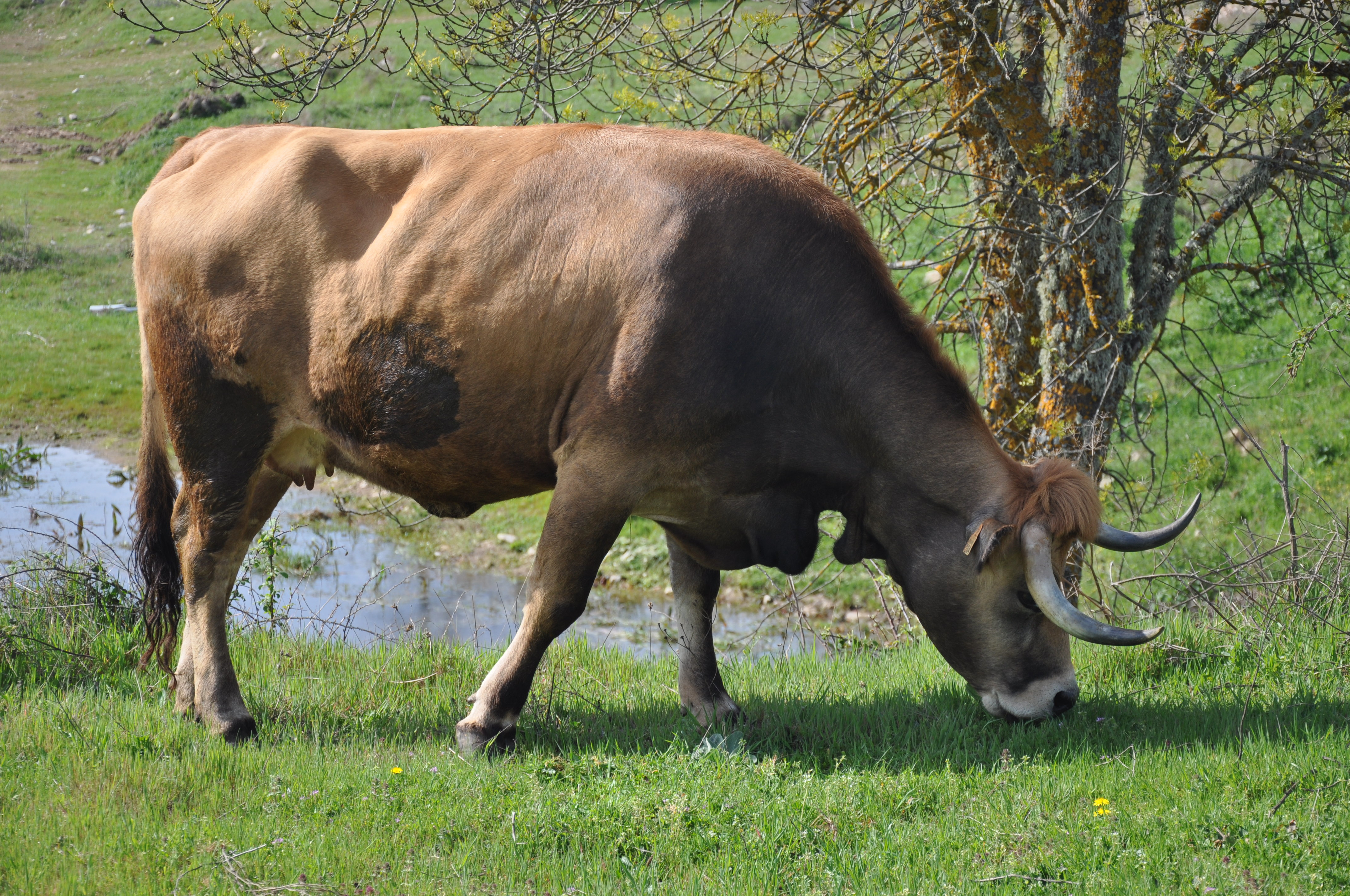 Vaca mirandesa, Cércio, Tras Os Montes, Portugal.